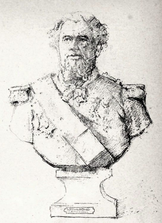 "Portrait de M. le vice-amiral Cloué, ministre de la marine."